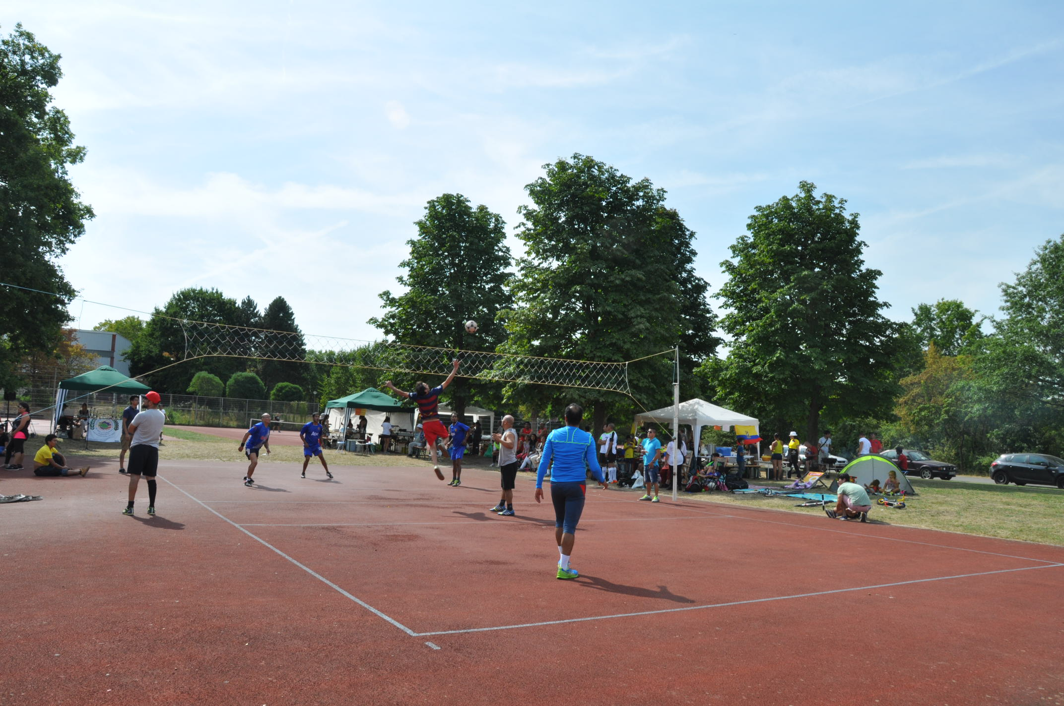 Erstes Ecuavoley-Turnier in Darmstadt - Germany 2017